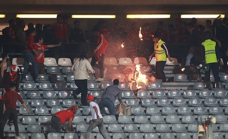 هواداران تیم فوتبال تراکتورسازی تبریز در مسابقه این تیم با استقلال تهران در ورزشگاه آزادی